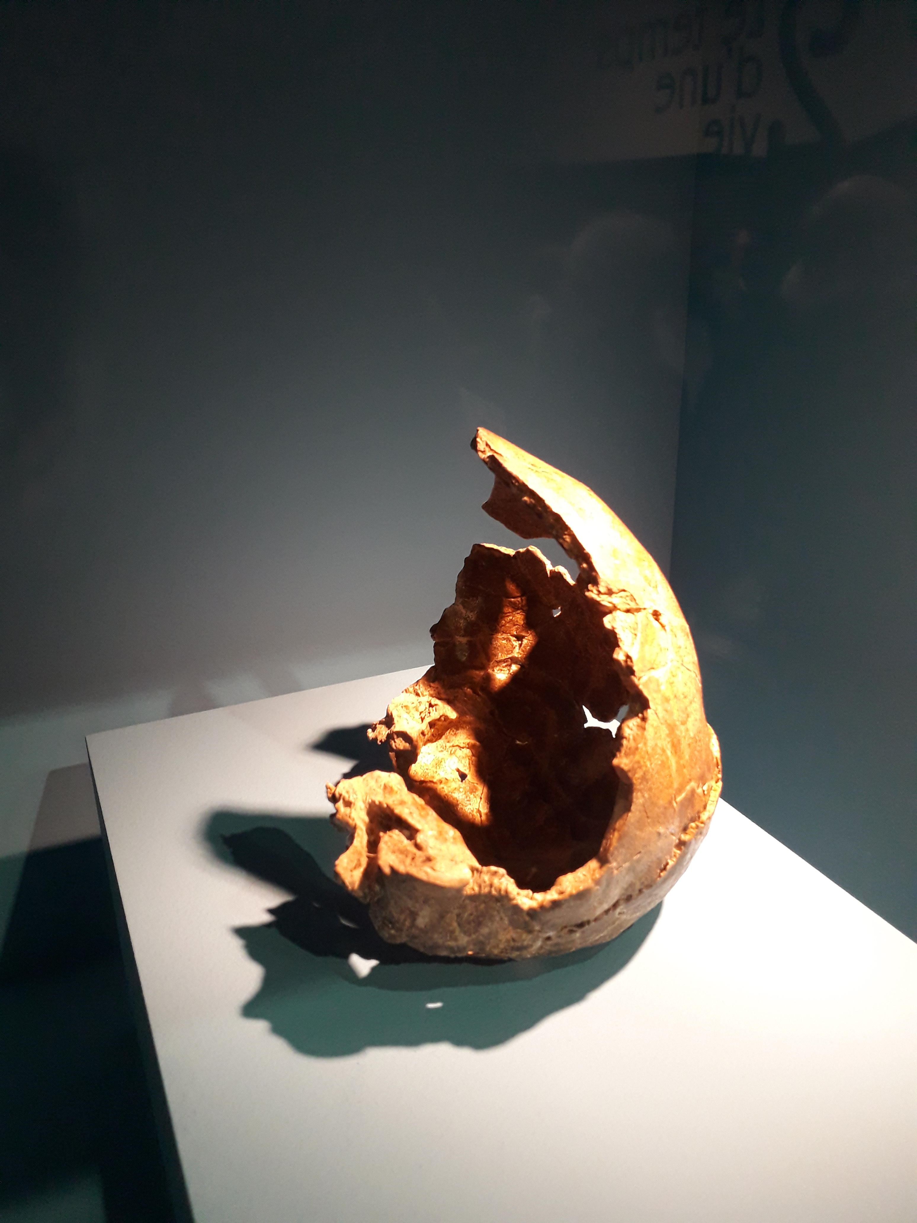 Crâne peut-être féminin de Biache 1. Os fossile. Biache-Saint-Vaast, France. Date : environ -180 000. Musée d'Archéologie nationale - Domaine national de Saint-Germain-en-Laye. Photographié à l'exposition "Néandertal, l'expo" au musée de l'Homme à Paris en avril 2018.